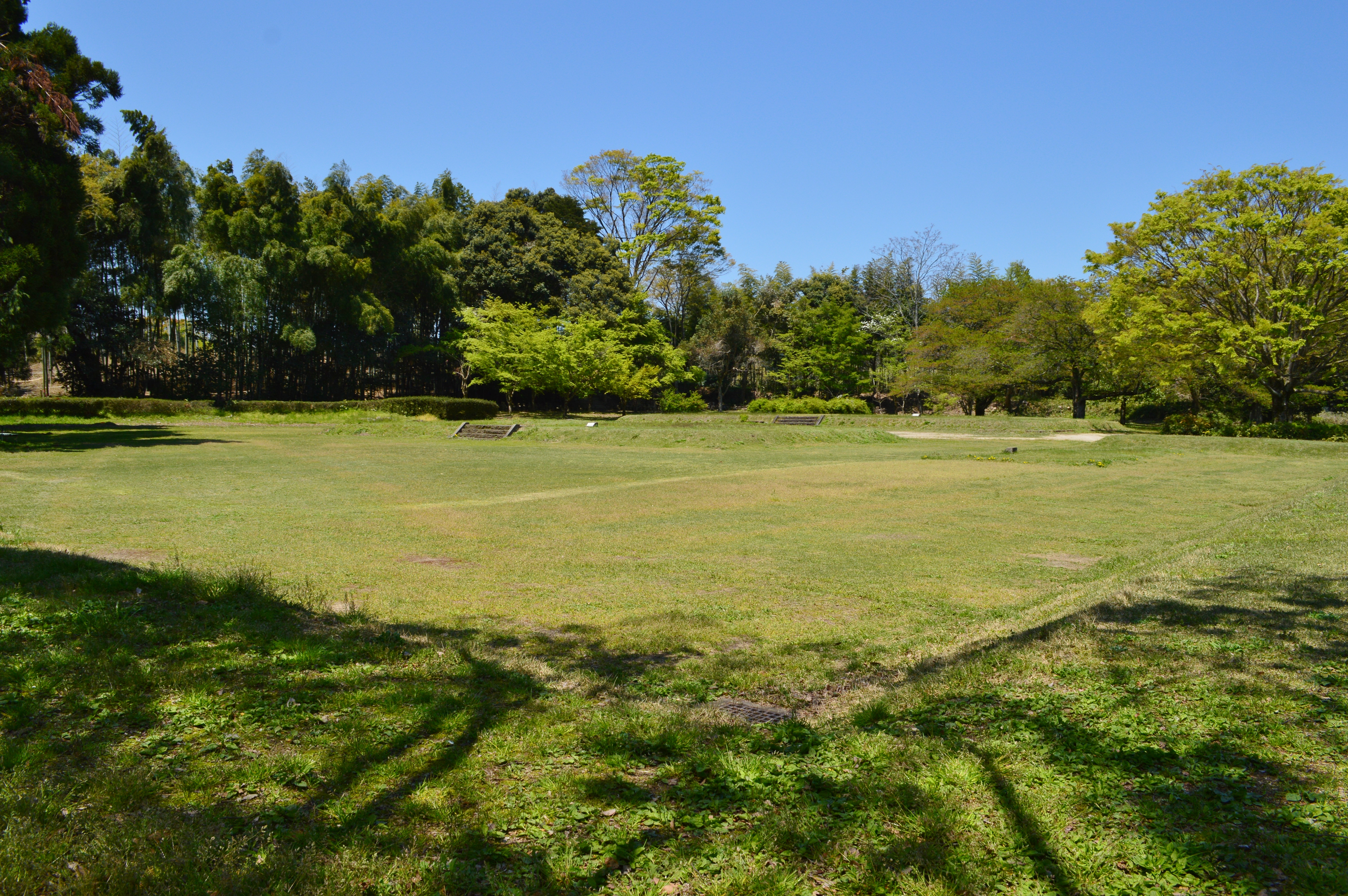 伯耆国分寺跡 全景